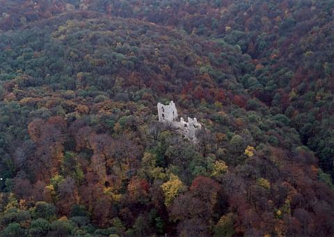 Vértessomló -castle: Vitányvár, Hungary, aerialphotography